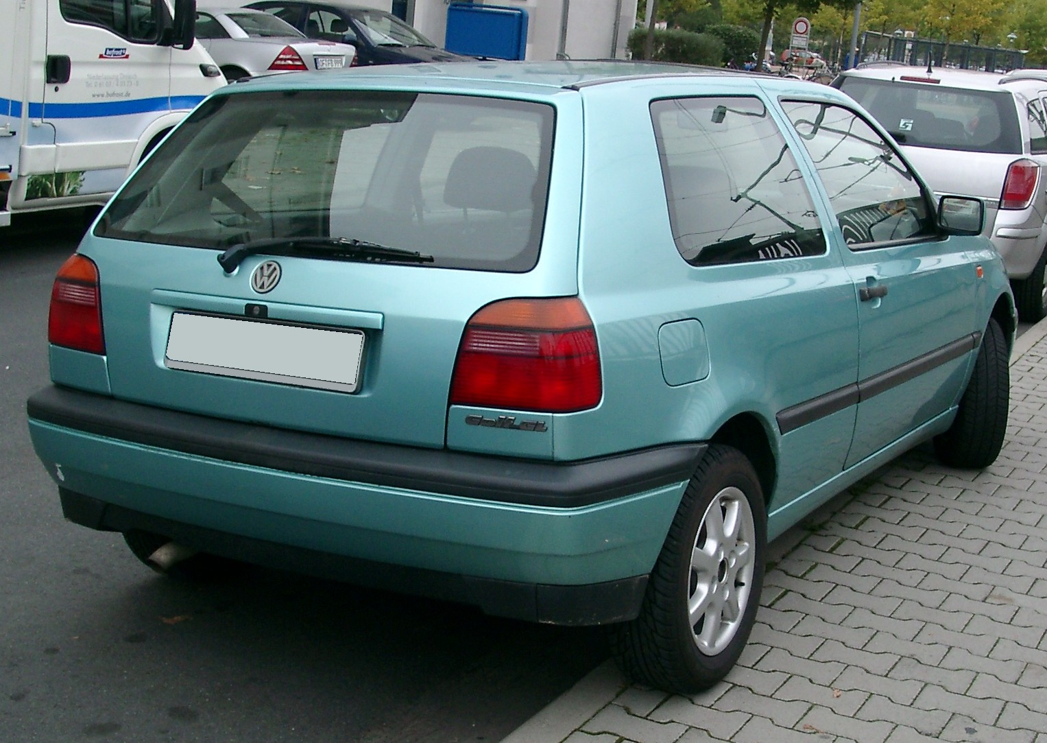 VW Golf III